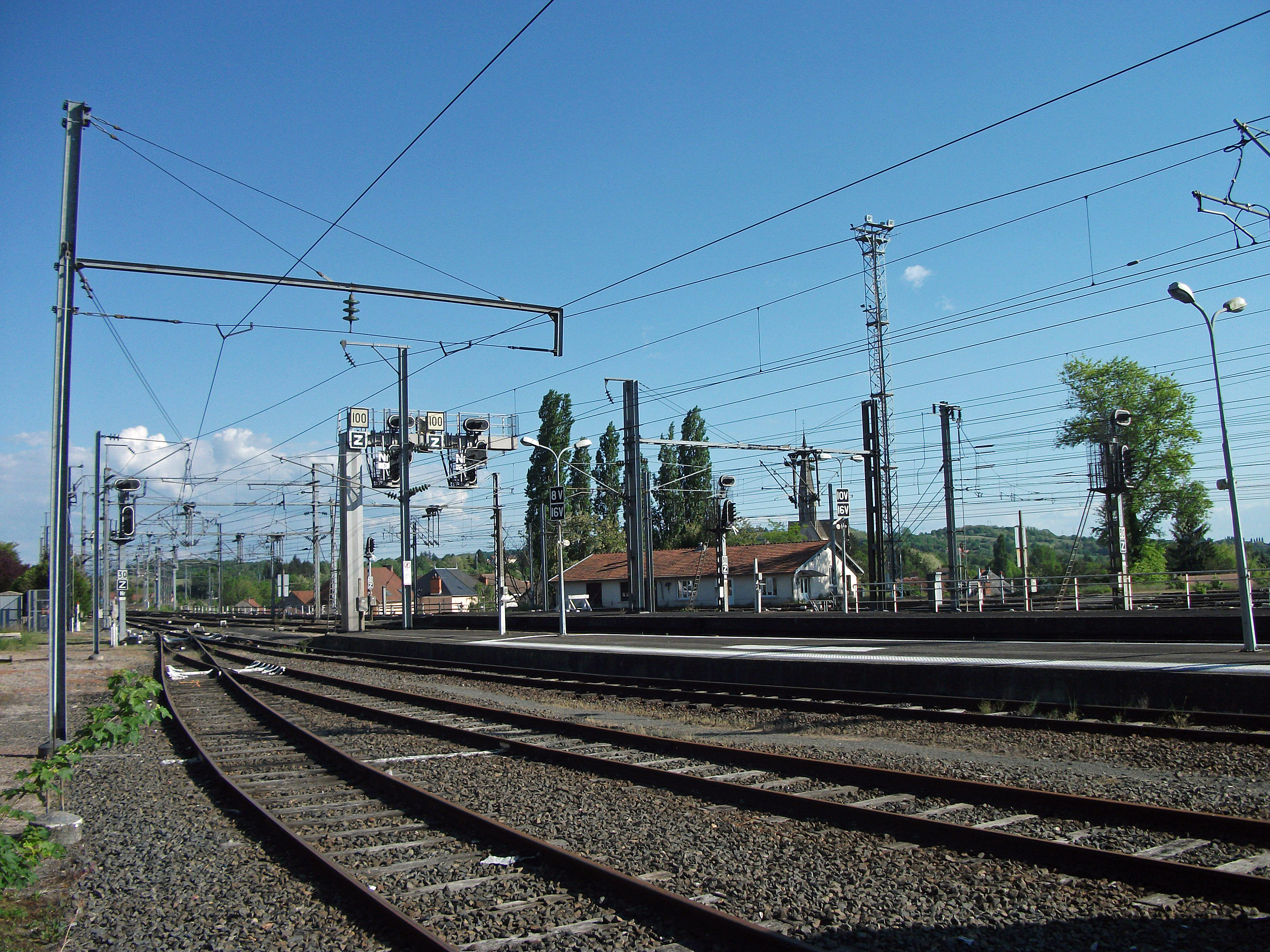 Voies au sud de la gare de Saint-Germain-des-Fossés (Auvergne), sur la ligne de Moret à Lyon-Perrache, cette gare est aussi à l'origine des lignes de Saint-Germain à Darsac (vers Vichy) et de Saint-Germain à Nîmes-Courbessac (vers Gannat).